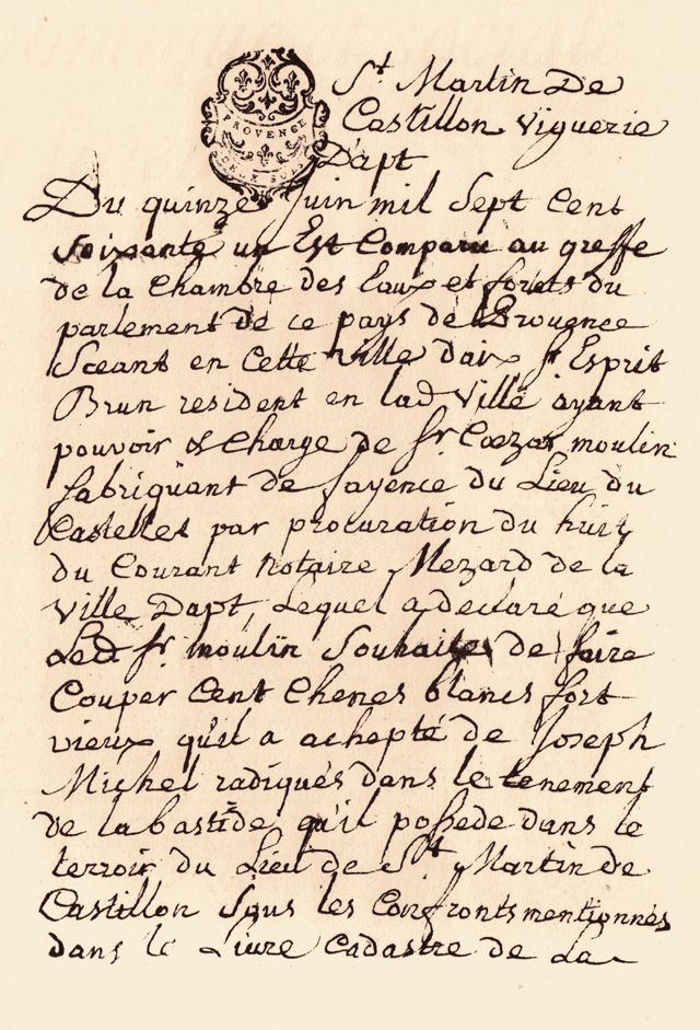 Demande d'autorisation de César Moulin, pour une coupe de bois destinée à son four à faïence de Castellet , le 15 juin 1761